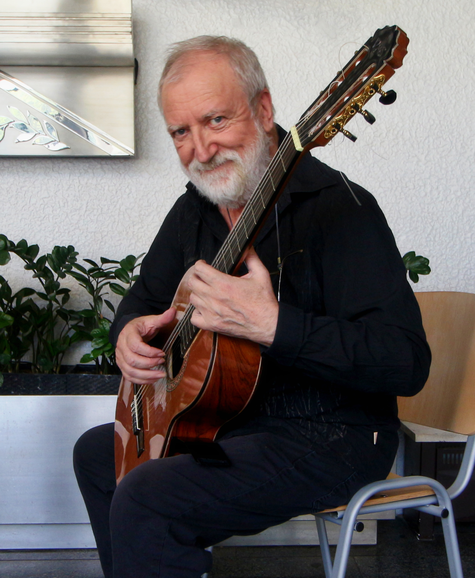 Stěpán Rak v červenci 2019